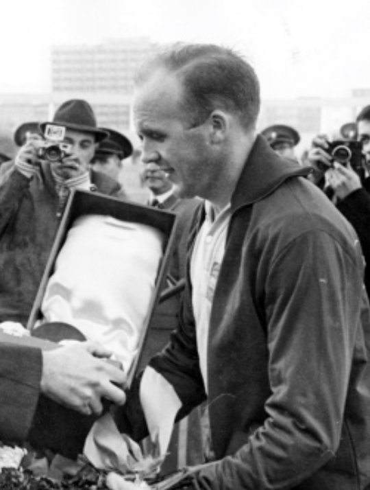 Prawitz Öberg en 1962